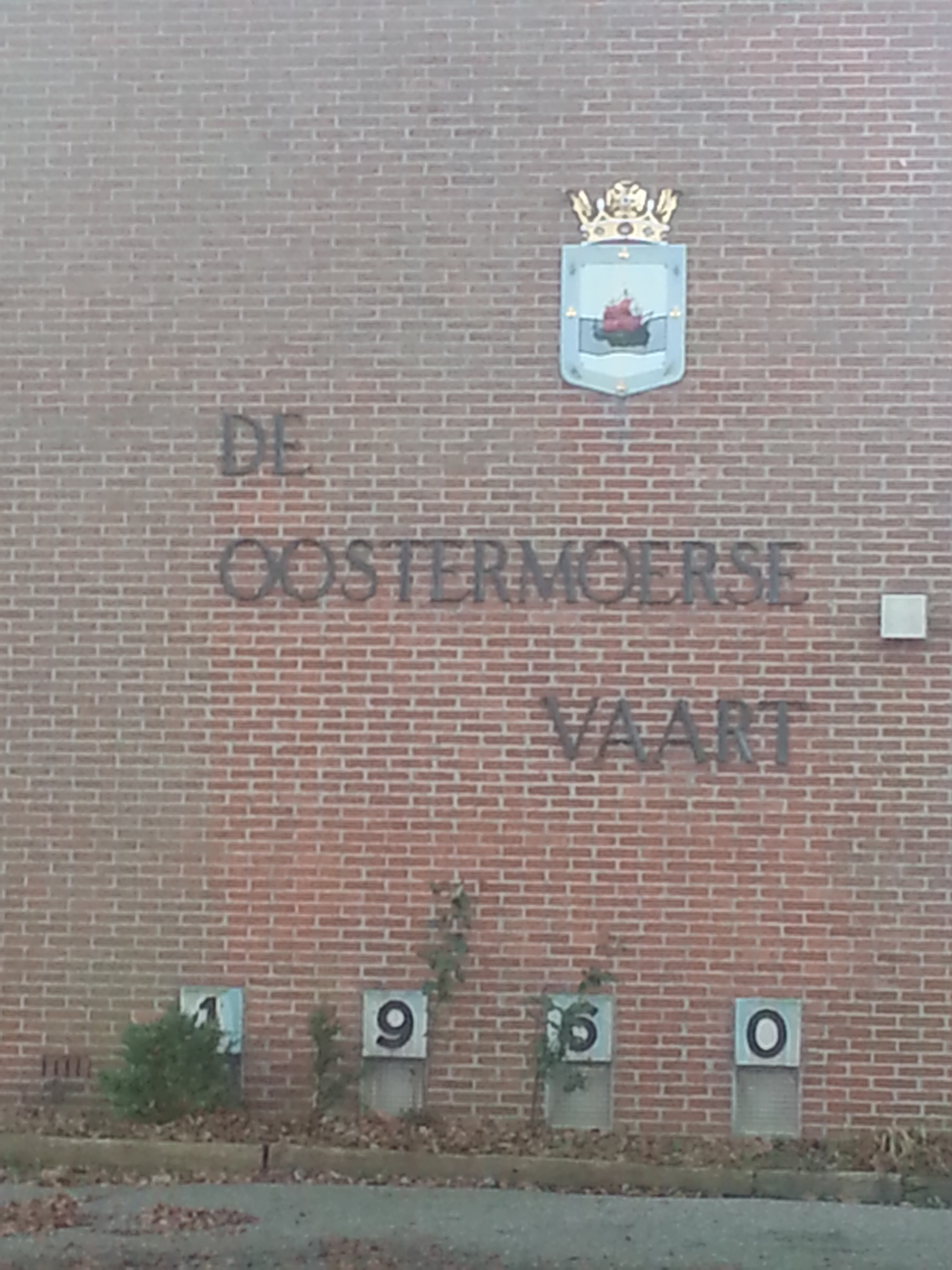 Het wapen van het waterschap Oostermoerse Vaart ergens in Gieten